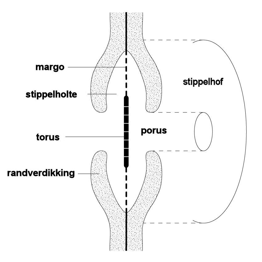 Hofstippel van een naaldboom (Pinaceae)